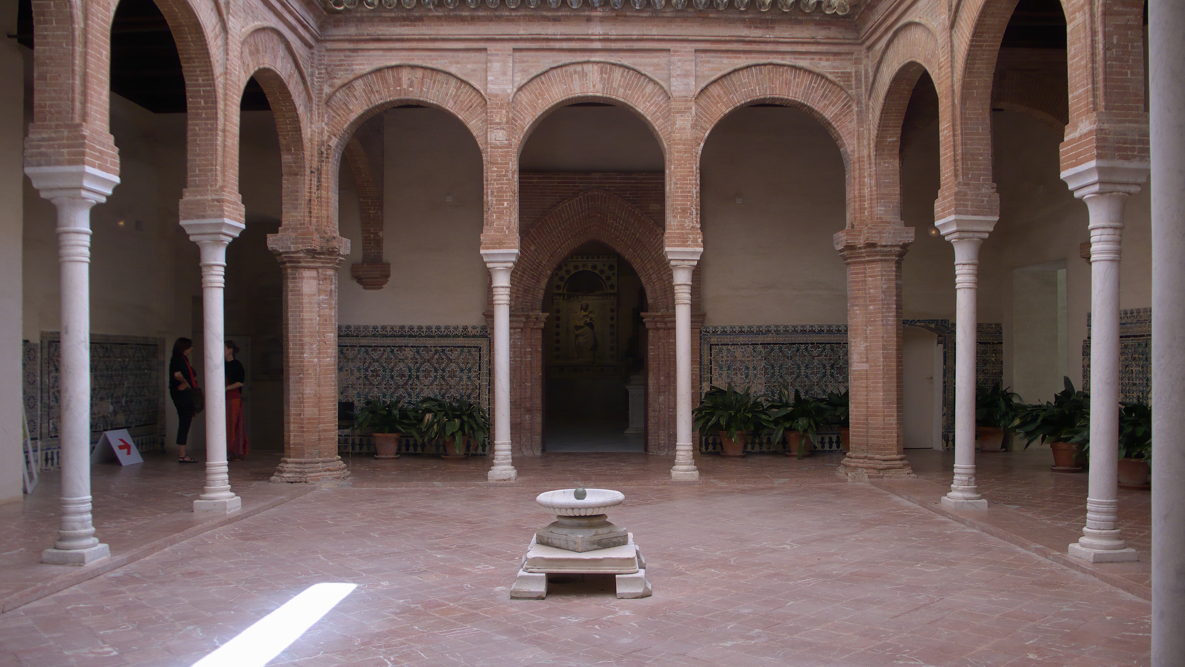 El Claustrillo (1454) Monasterio de la Cartuja de Santa María de las Cuevas.